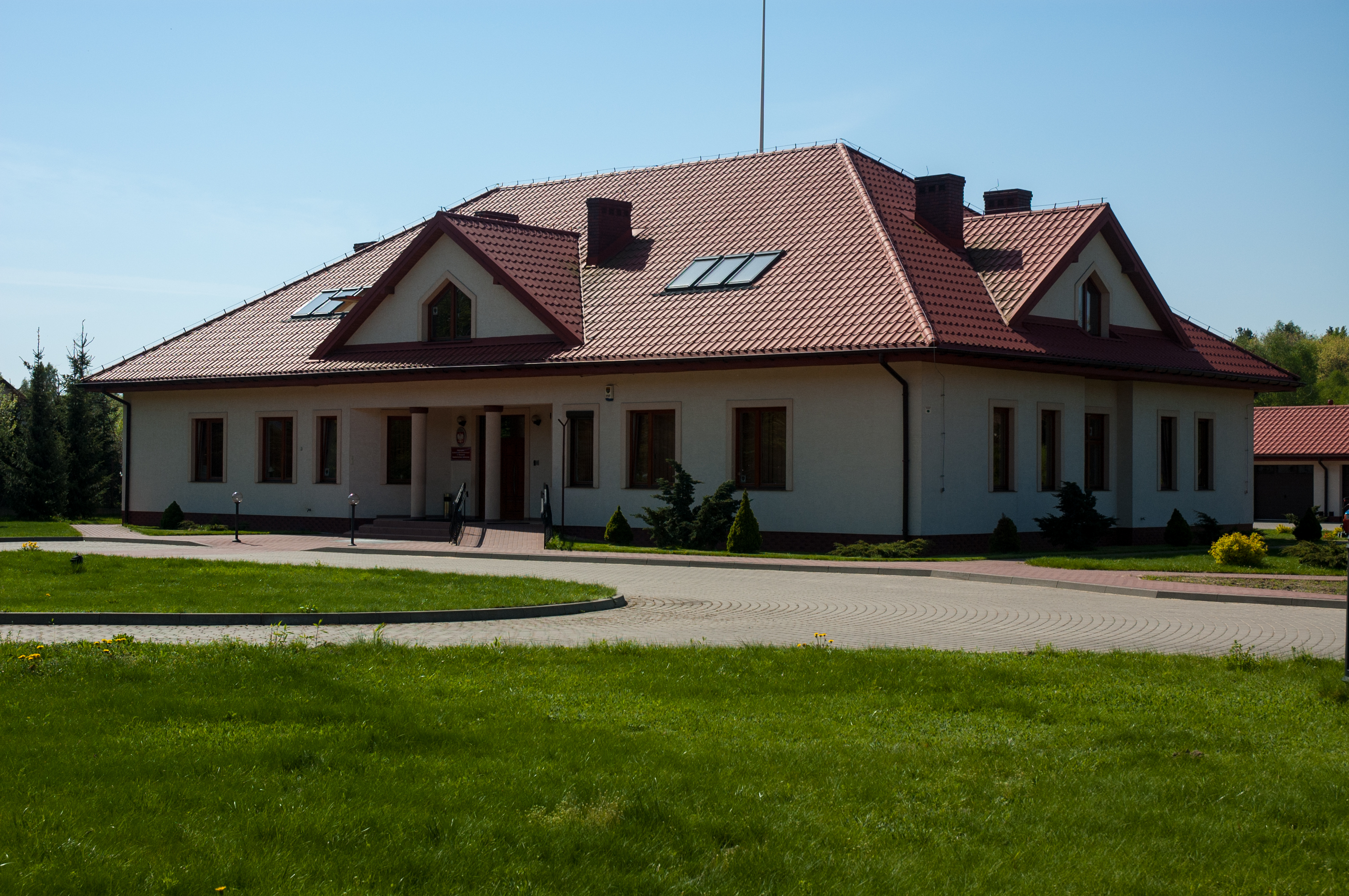 Jabłonna - Siedziba nadleśnictwa - ulica Wiejska 20